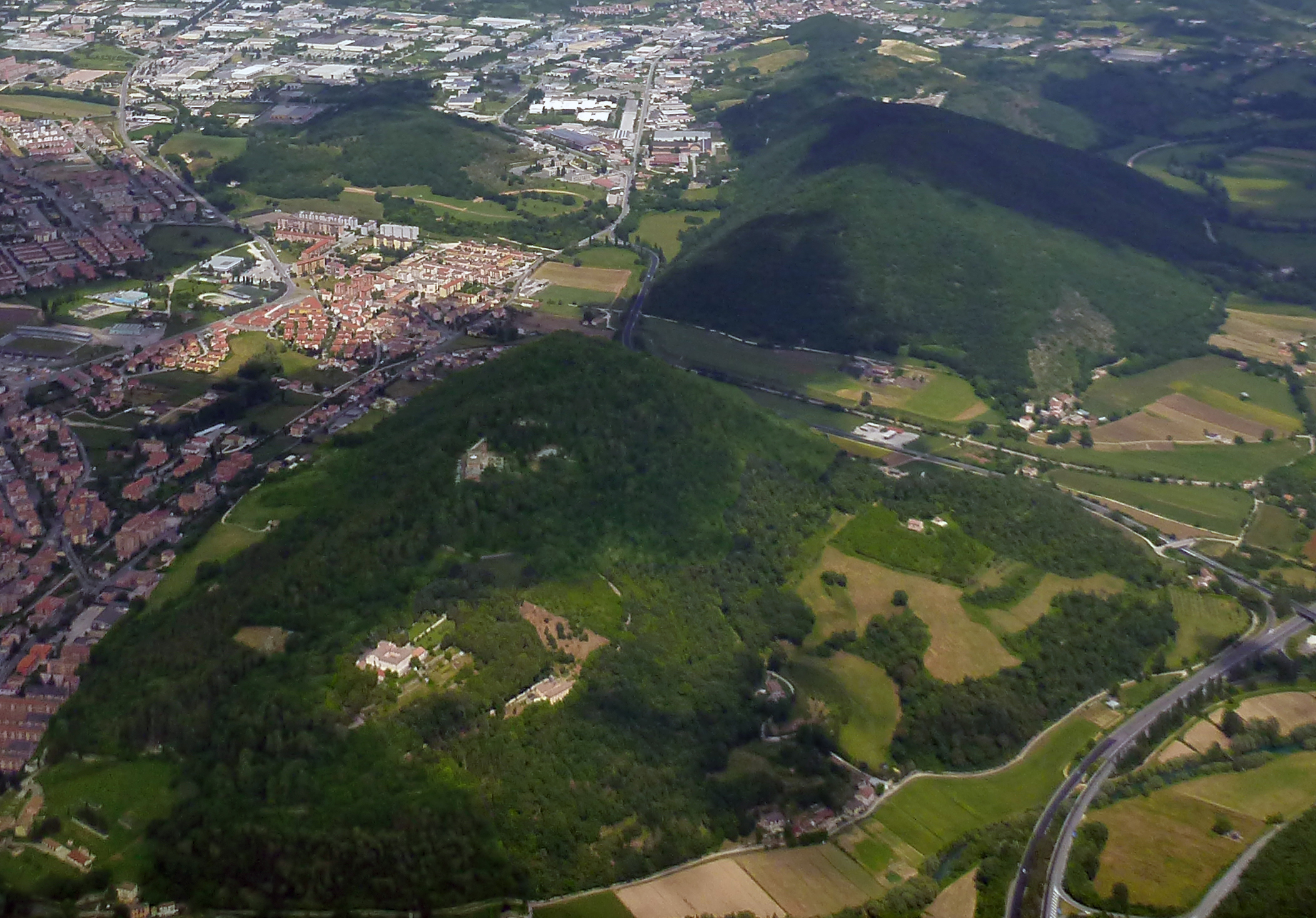 Il Colle di Lesta (in alto a destra) e il colle di San Mauro (in basso), nei pressi di Rieti, visti dall'alto